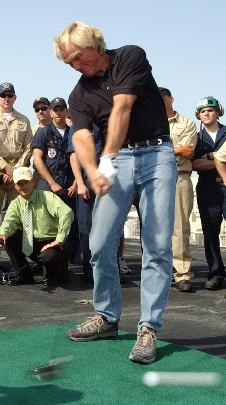 Profi-Golfspieler Greg Norman